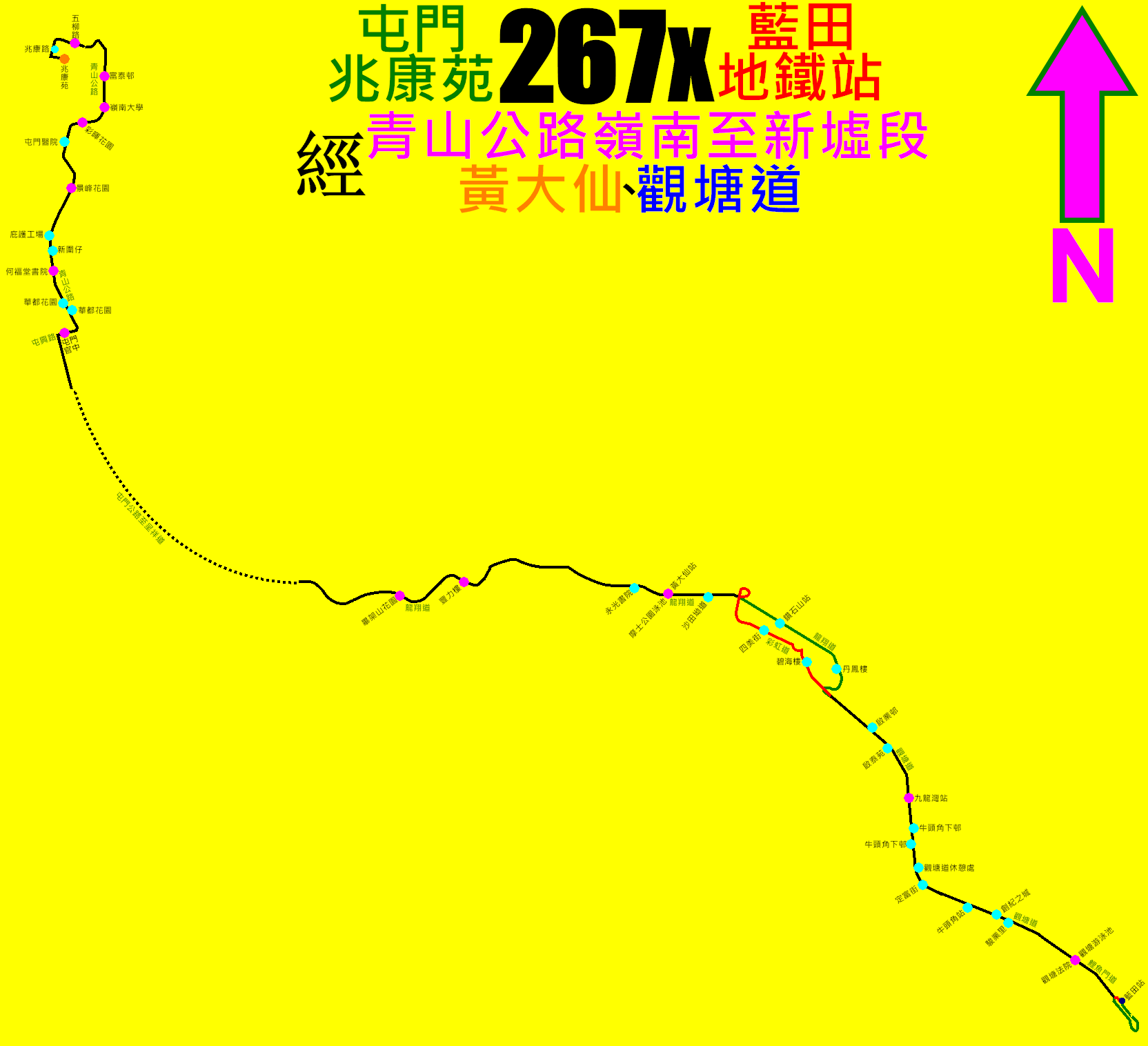 中文（香港）: 九巴267X線的走線圖